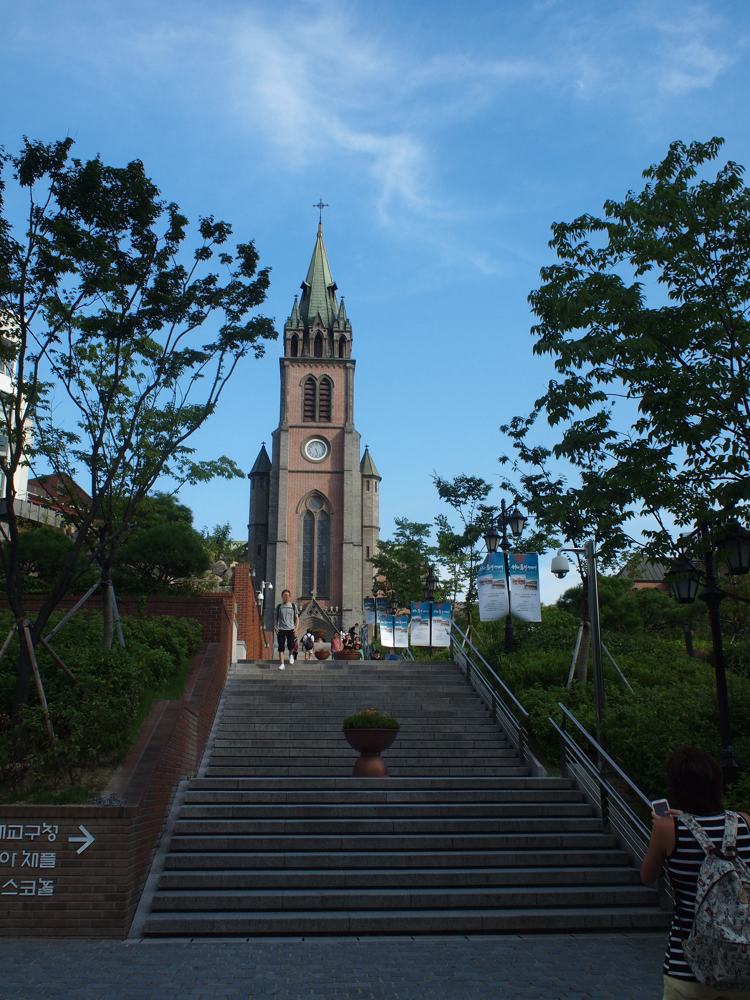 명동성당